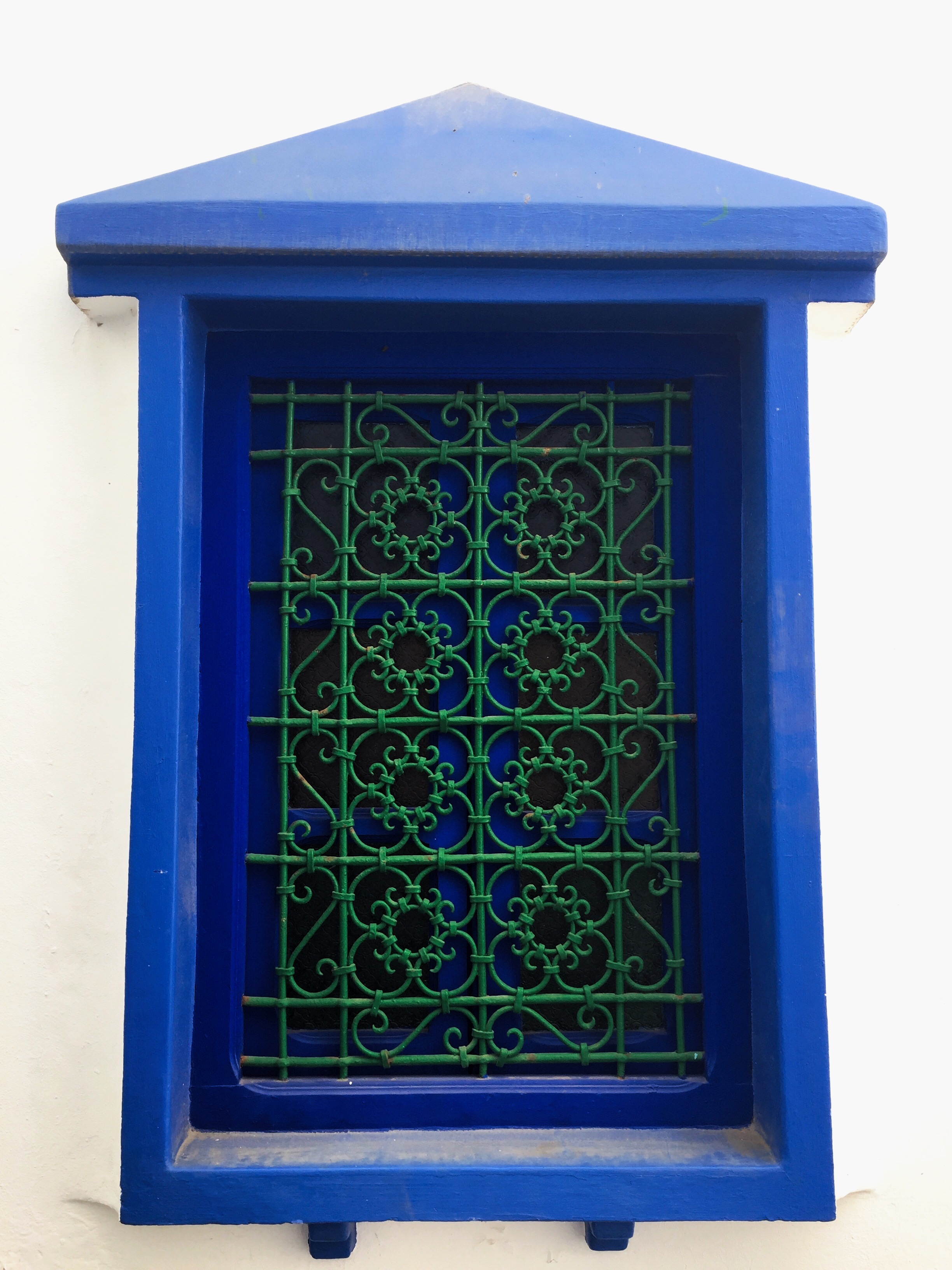 نافذة مغربية عليها مصبع تقليدي من الحديد المطاوع في مدينة أصيلة